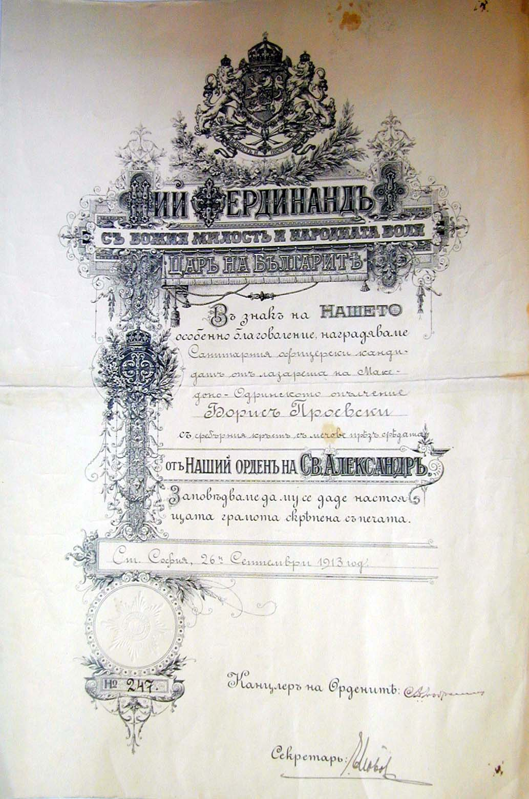 Грамота за награждаване на македоно-одринския опълченец Борис Проевски от град Горна Джумая със сребърен кръст с мечове на ордена „Свети Александър“.